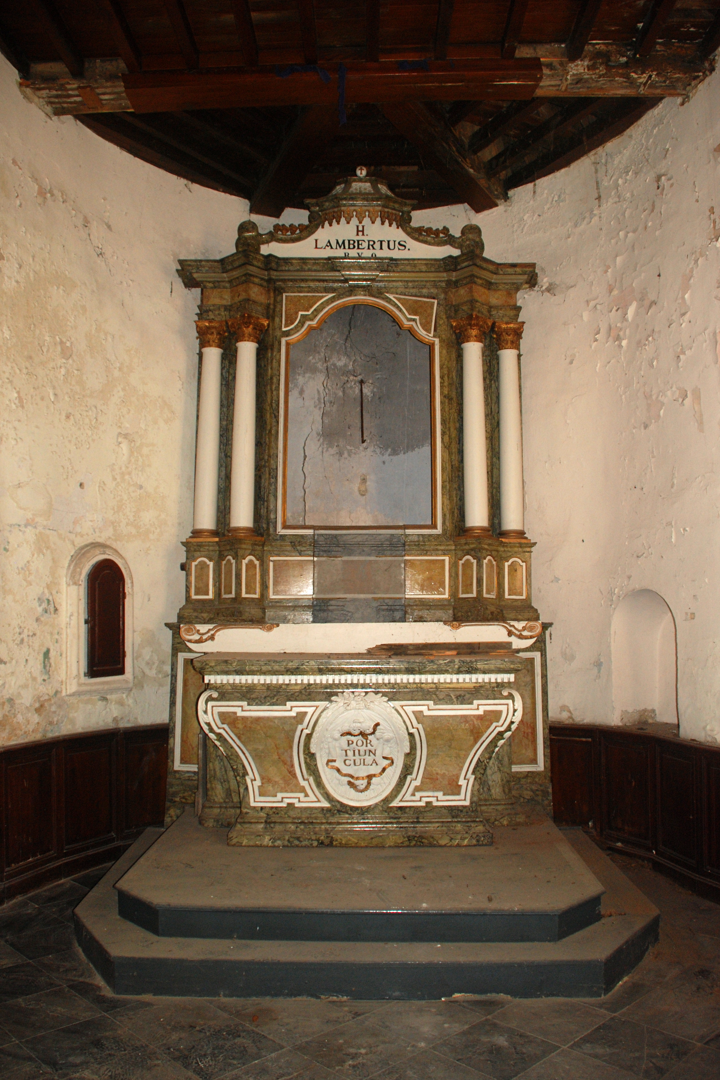 Belgique - Brabant flamand - Tirlemont - Église Saint-Lambert de Groot-Overlaar